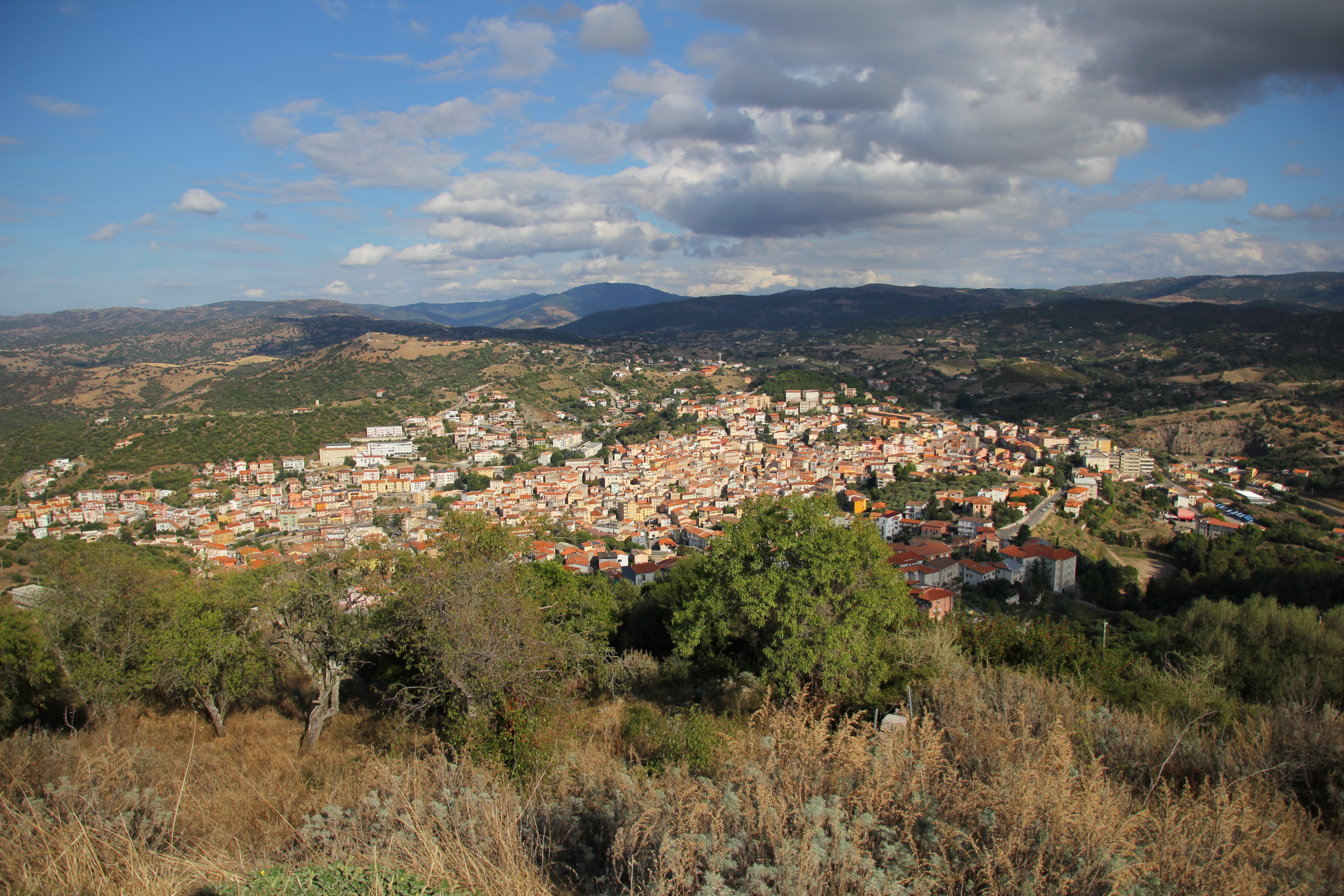 Ozieri - Panorama